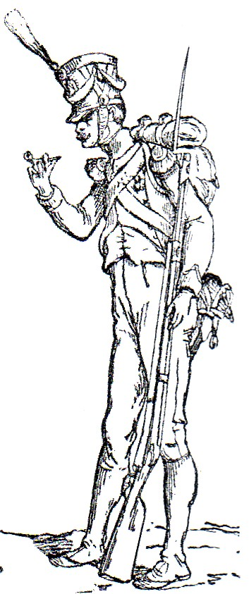 Volteggiatore della Vecchia Guardia